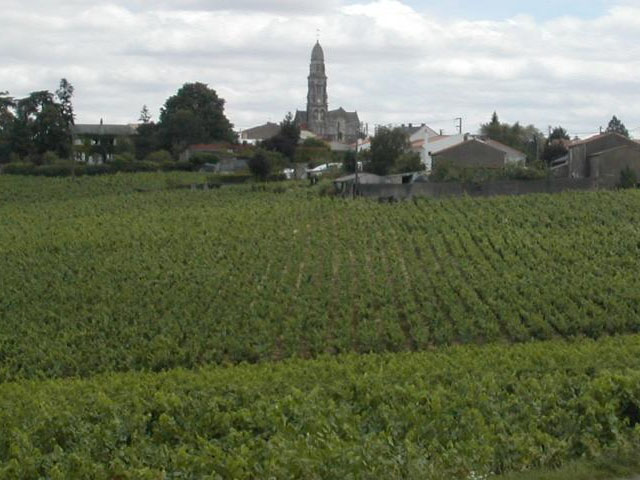 La commune de Saint-Fiacre-sur-Maine